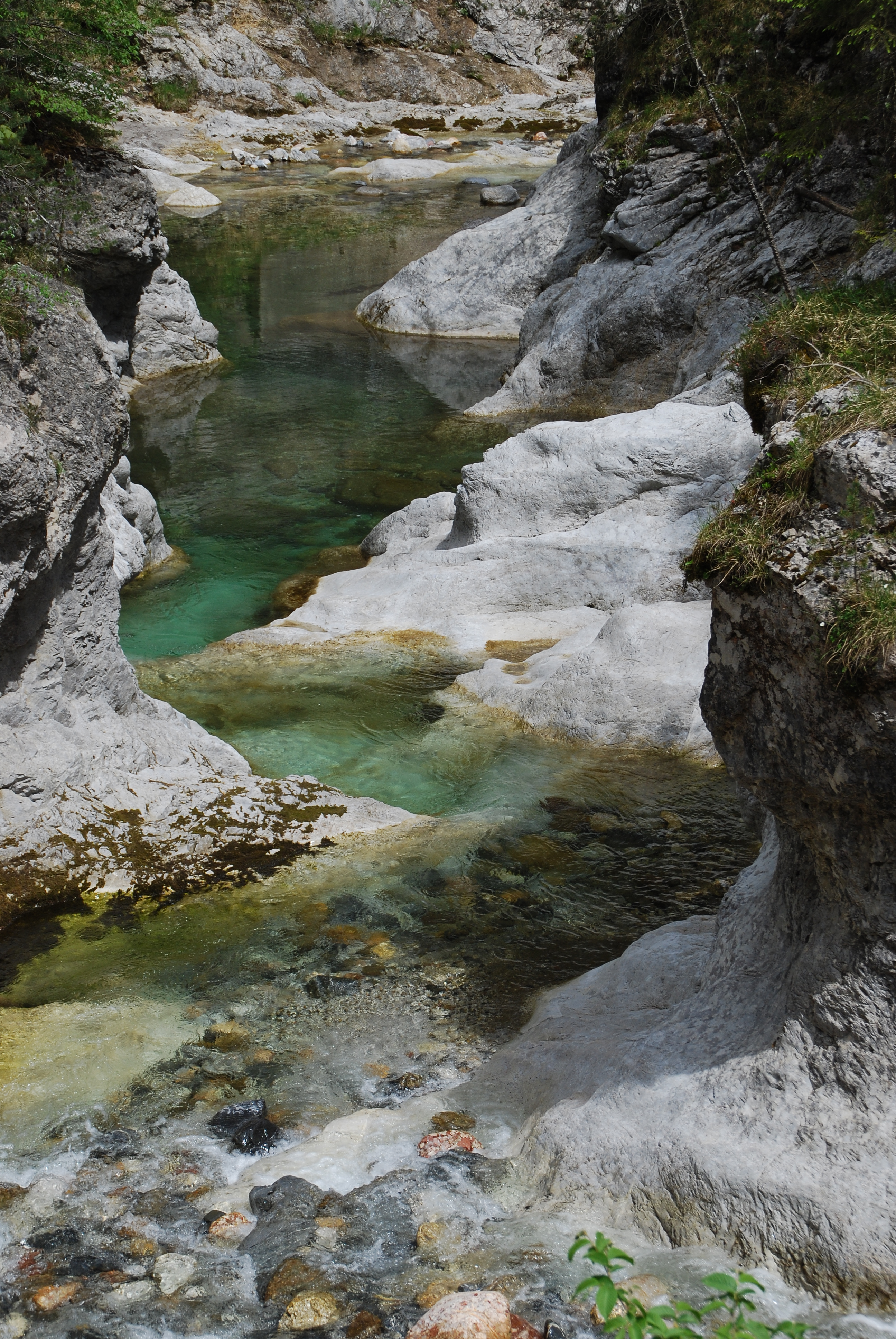 Trögerner Klamm This media shows the nature reserve in Carinthia with the ID NSG.015.